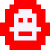 Sprite eines Homecomputer